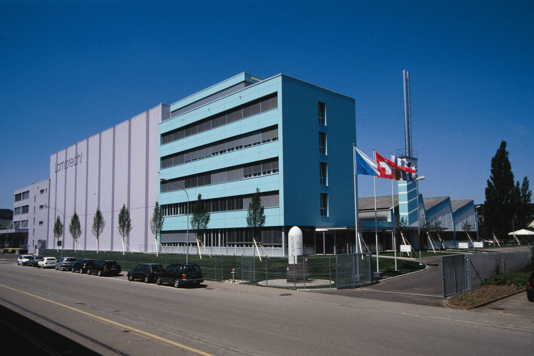 Gebäude der Lamprecht AG in Regensdorf